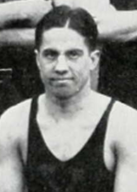 Vanderbilt basketball player Alvin "Pep" Bell